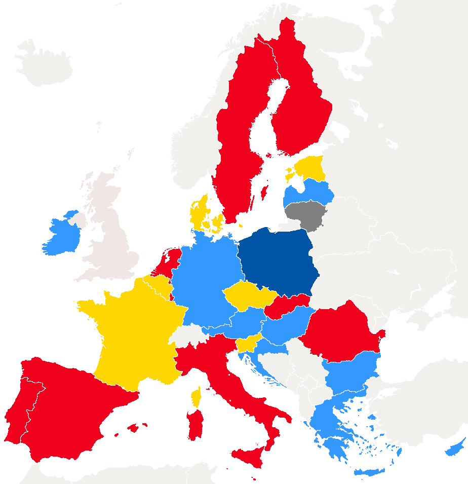 Sestava Komisije Ursule von der Leyen glede na politične stranke